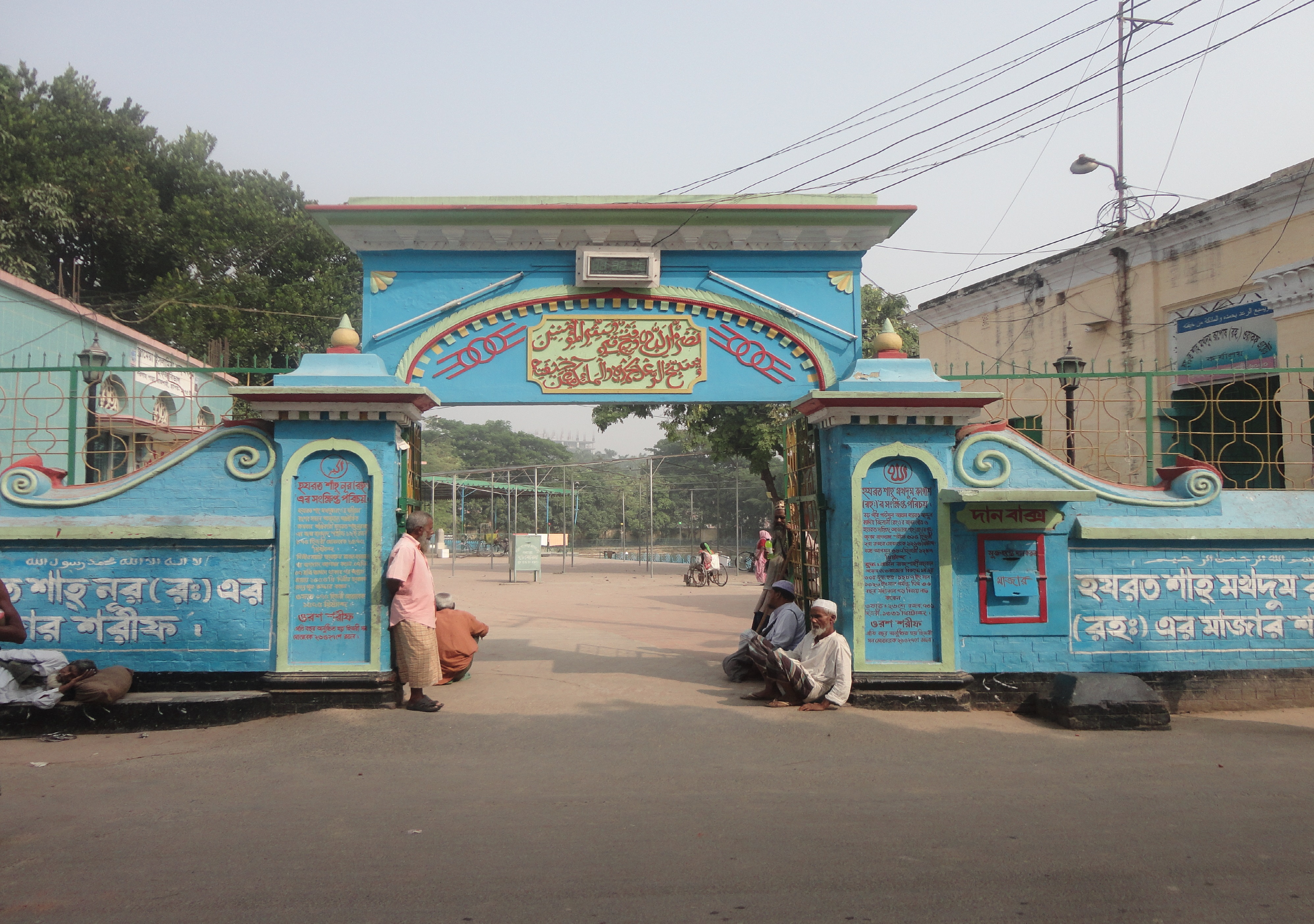 রাজশাহীতে অবস্থিত শাহ মখদুমের মাজারের প্রধান ফটক